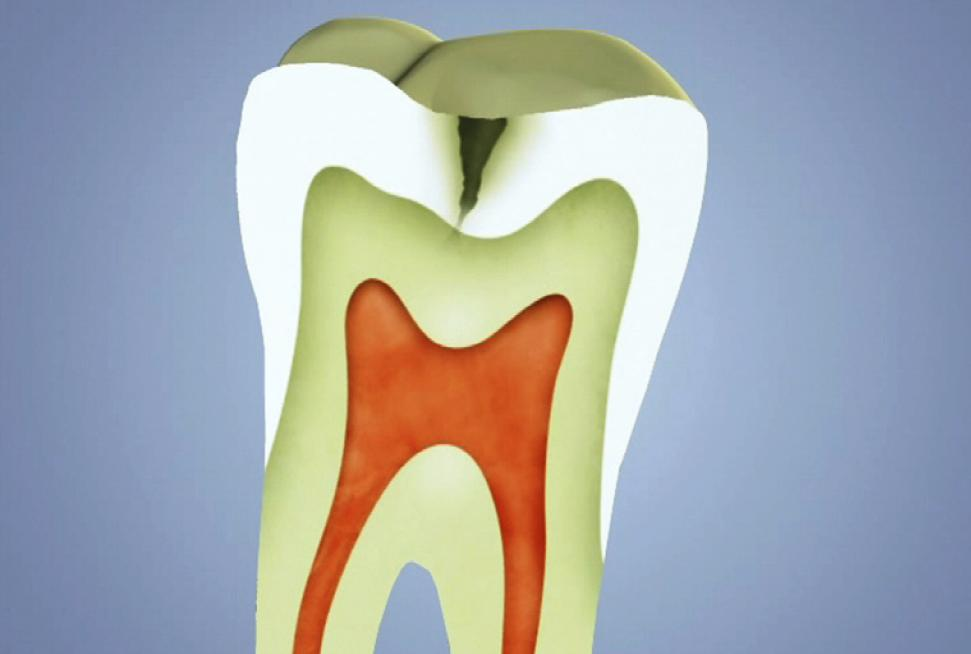 2.stadium zubniho kazu